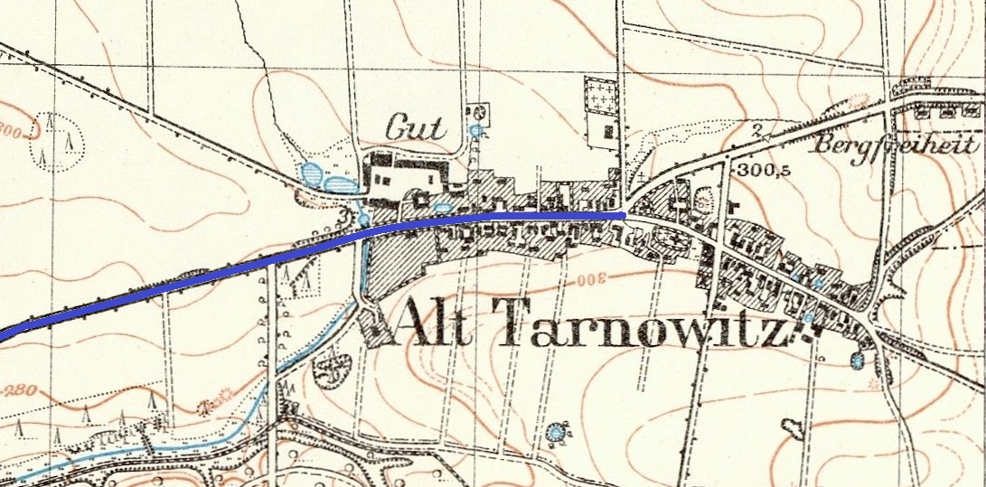 Ulica Pyskowicka w Tarnowskich Górach-Starych Tarnowicach na niemieckiej mapie z 1929 (na podstawie mapy z 1883)